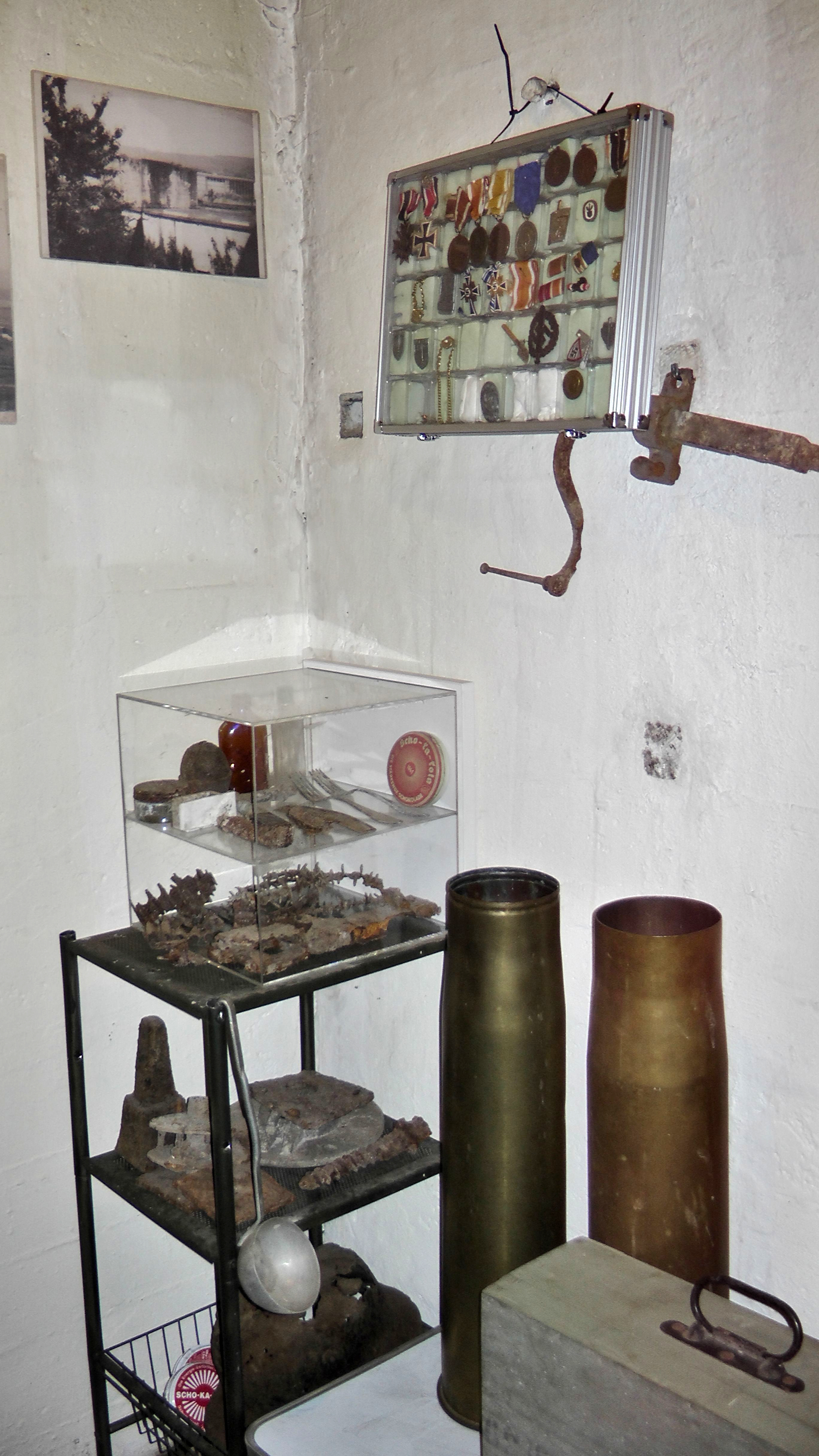 Westwallmuseum Konz, Ausstellungen